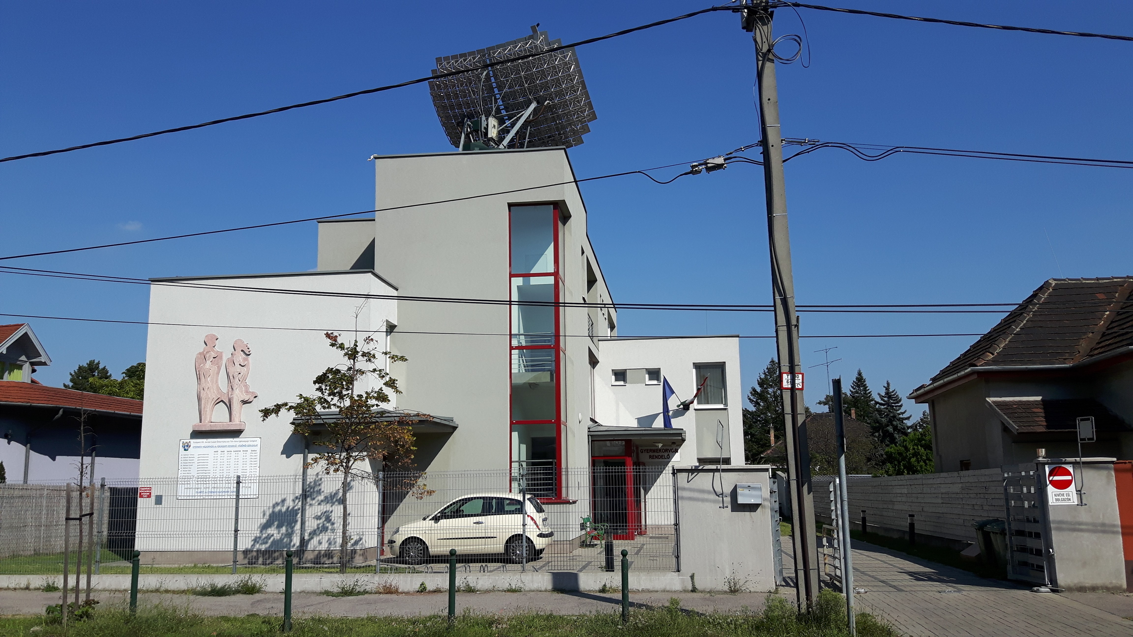 Csepeli Gyermek Háziorvosi Rendelő. - Budapest, XXI. kerület, Görgey Artúr tér 6.